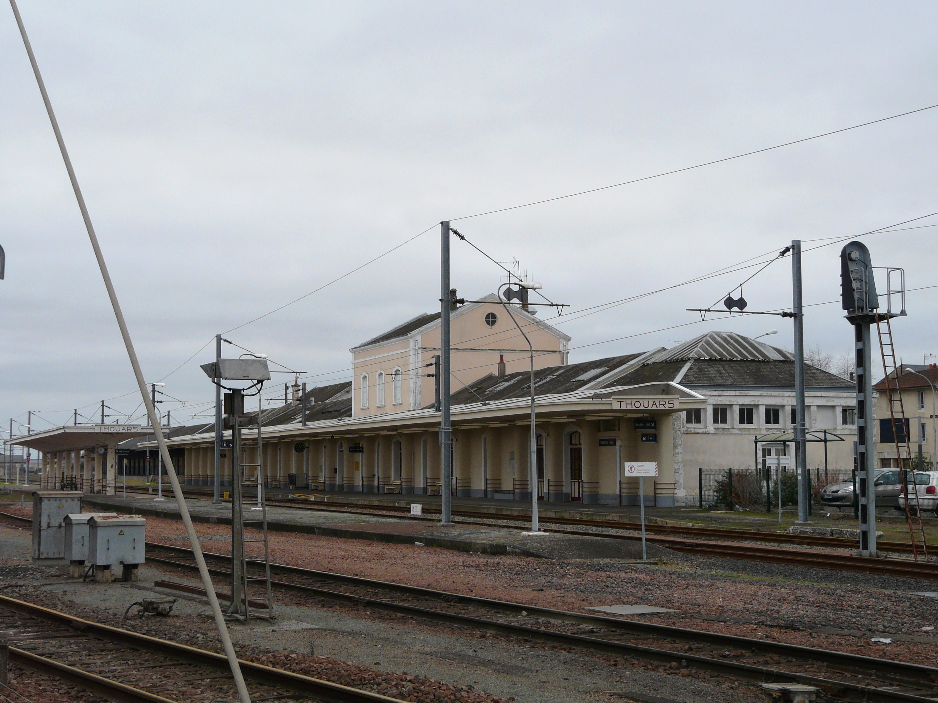 La gare de Thouars, Deux-Sèvres, France.